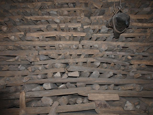 Zespół programu Dynamika Ekspozycji w 2010 roku został zaproszony przez Muzeum Początków Państwa Polskiego do współpracy przy opracowywaniu koncepcji warsztatów obywatelskich dla grup szkolnych odwiedzających muzeum.